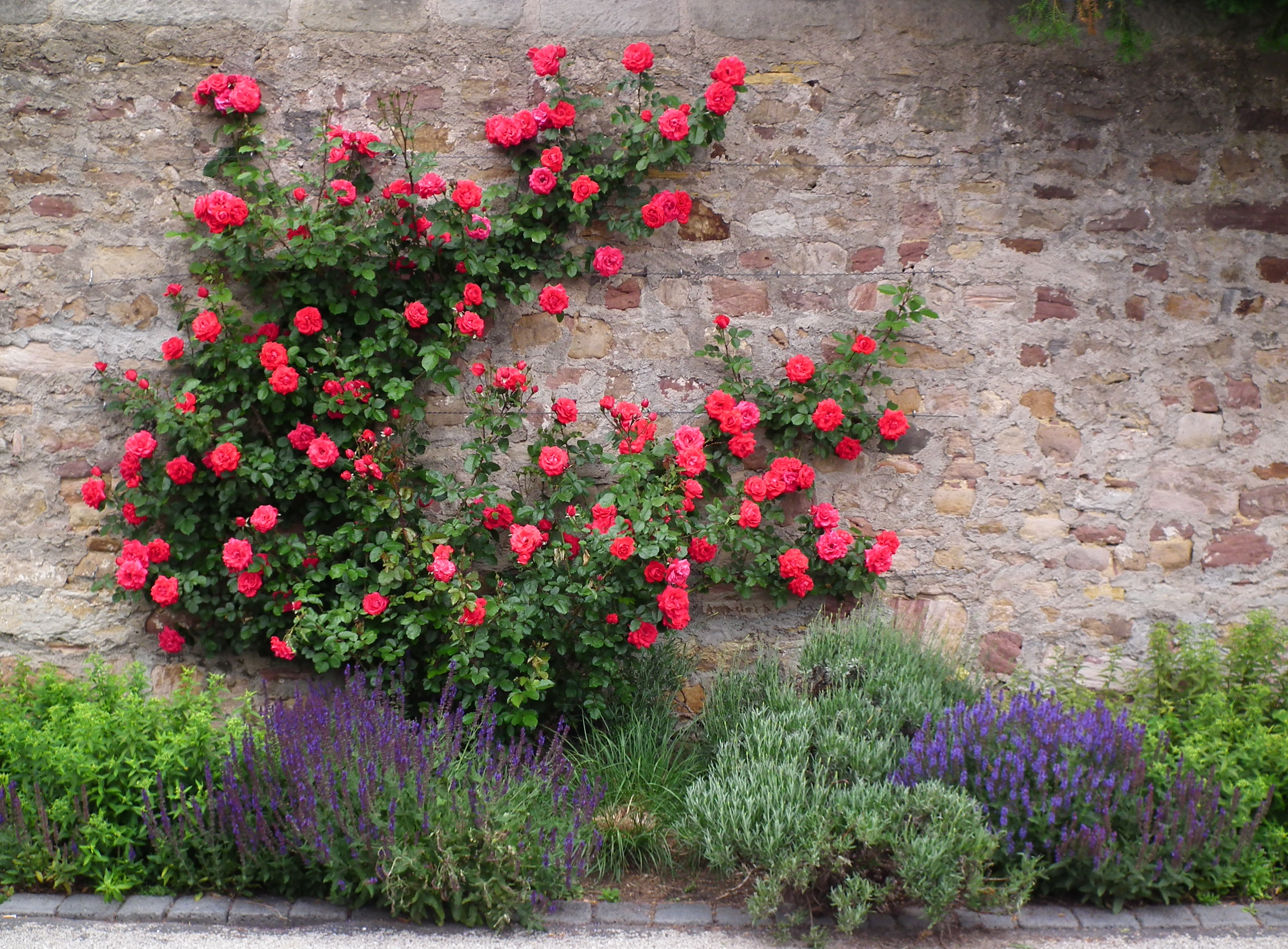 Rosen und Lavendel, fotografiert in Fulda (Hessen, Deutschland)